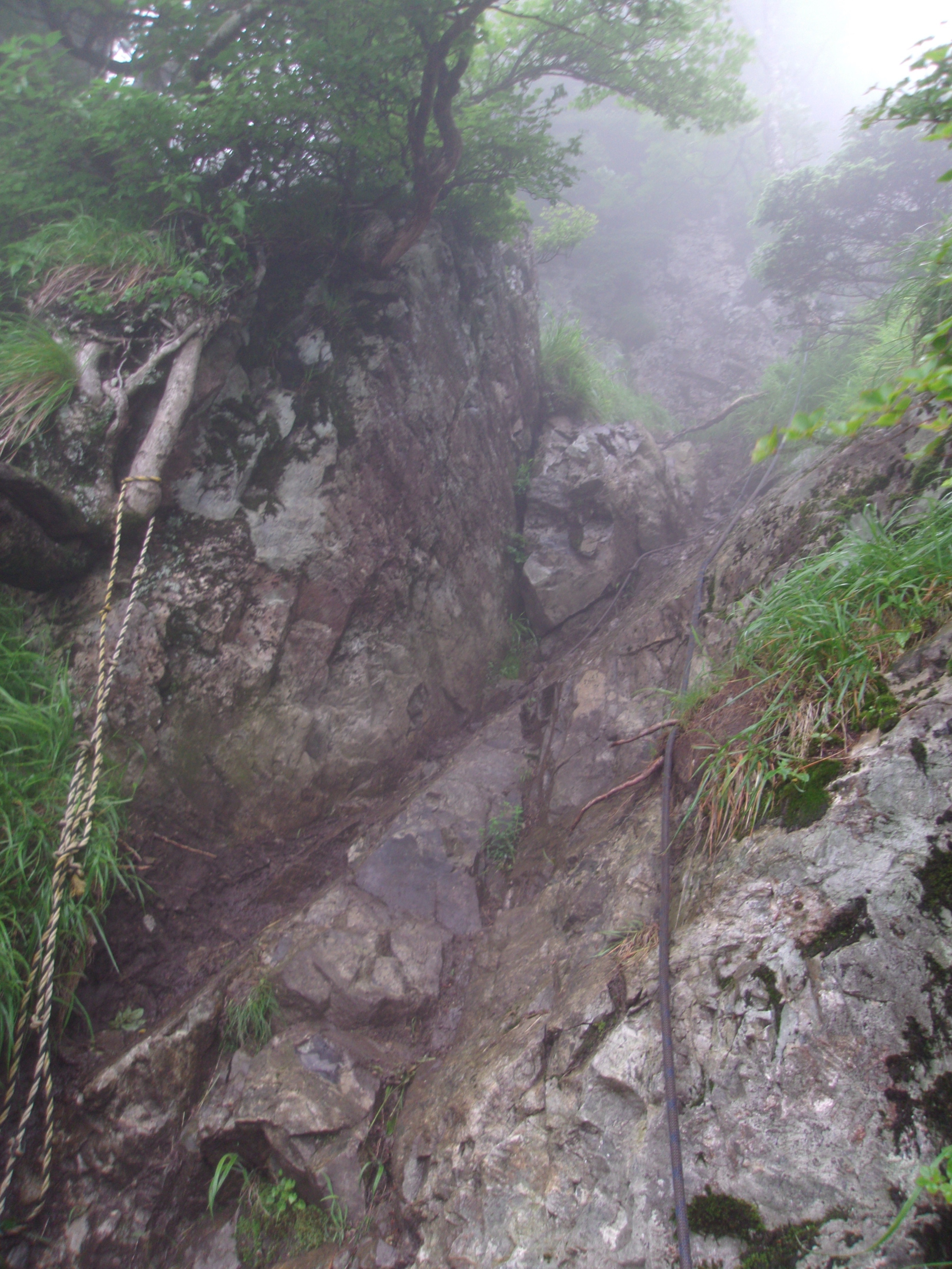 大峯奥駈道第47靡「五鈷嶺」を越えるため垂直登攀する岩場